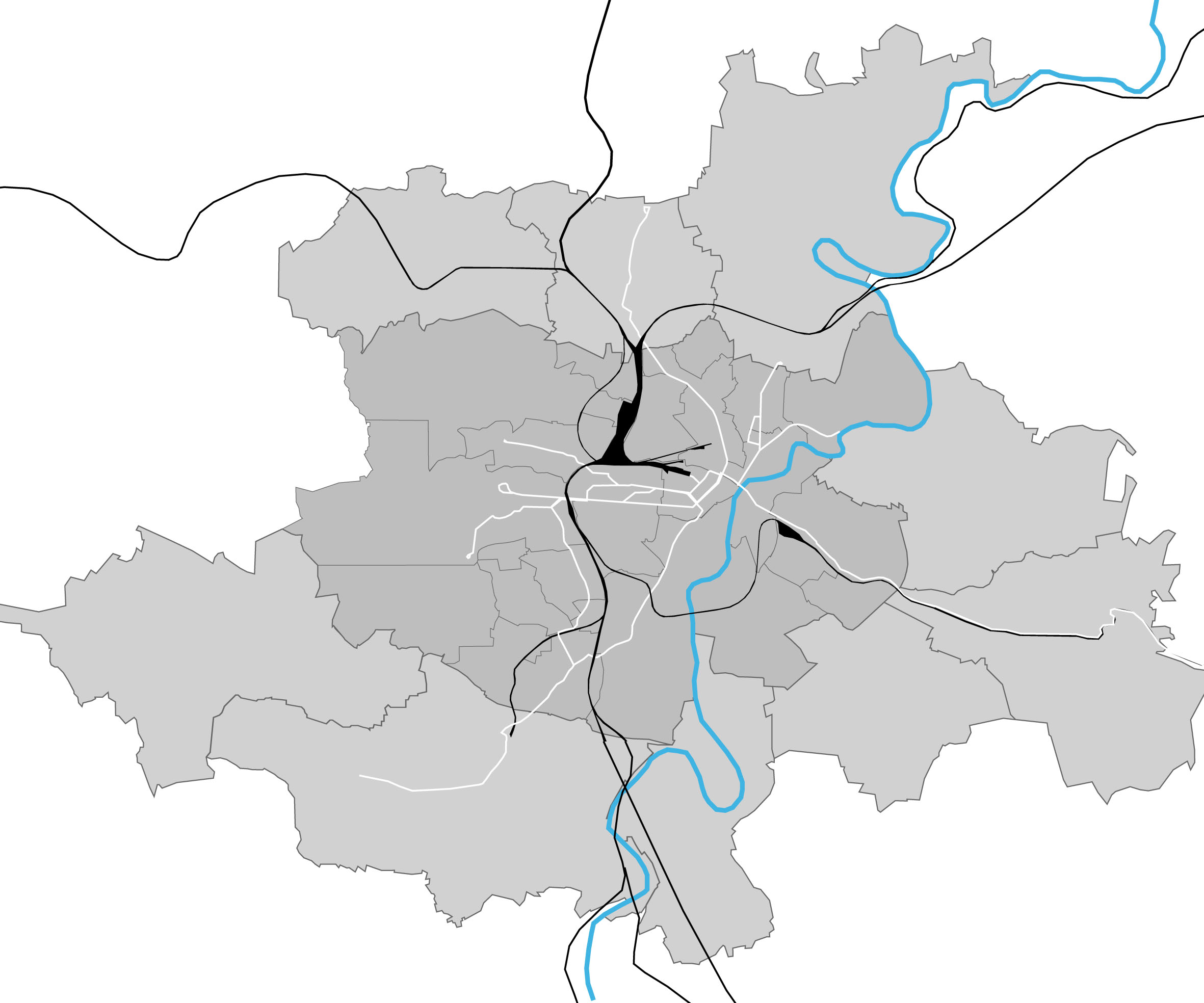 Schienennetz des Fern-, Regional- und Kommunalverkehrs im Bereich Kassel und Agglomeration